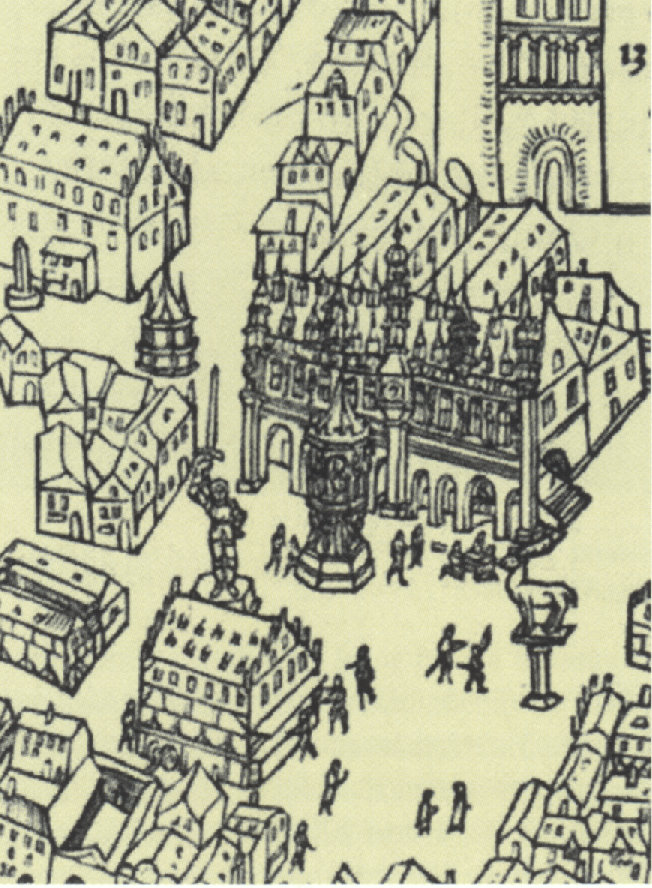 Der Alte Markt in Magdeburg als Ausschnitt des Holzschnitts Die Belagerung von Magdeburg